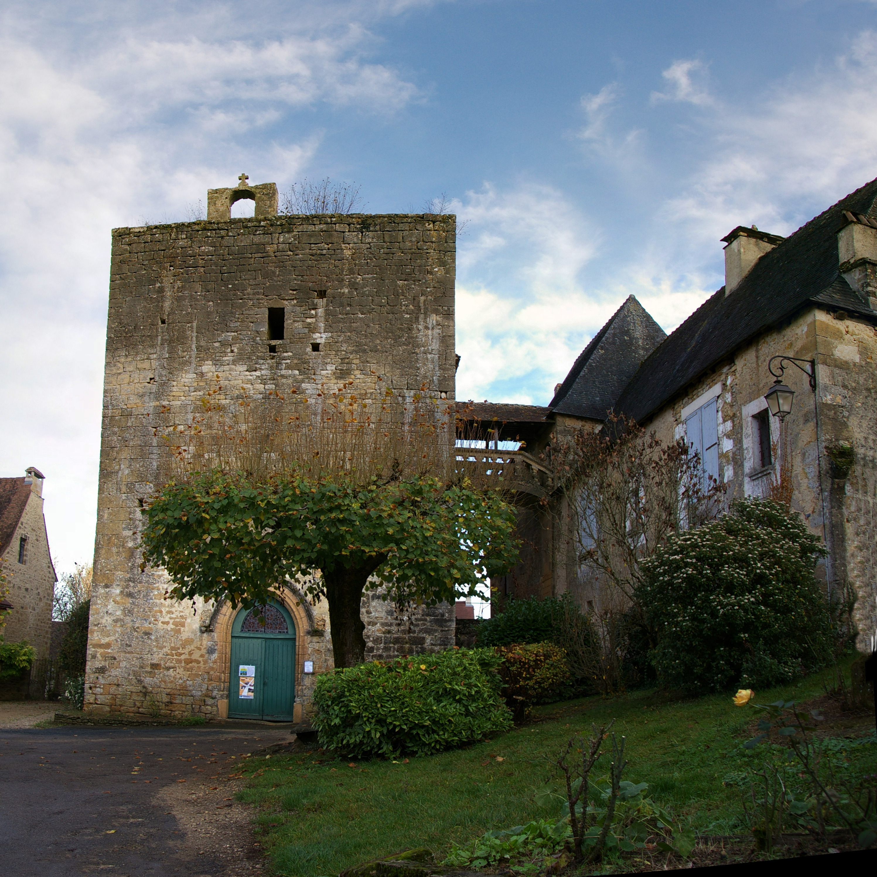 Église Saint-Étienne